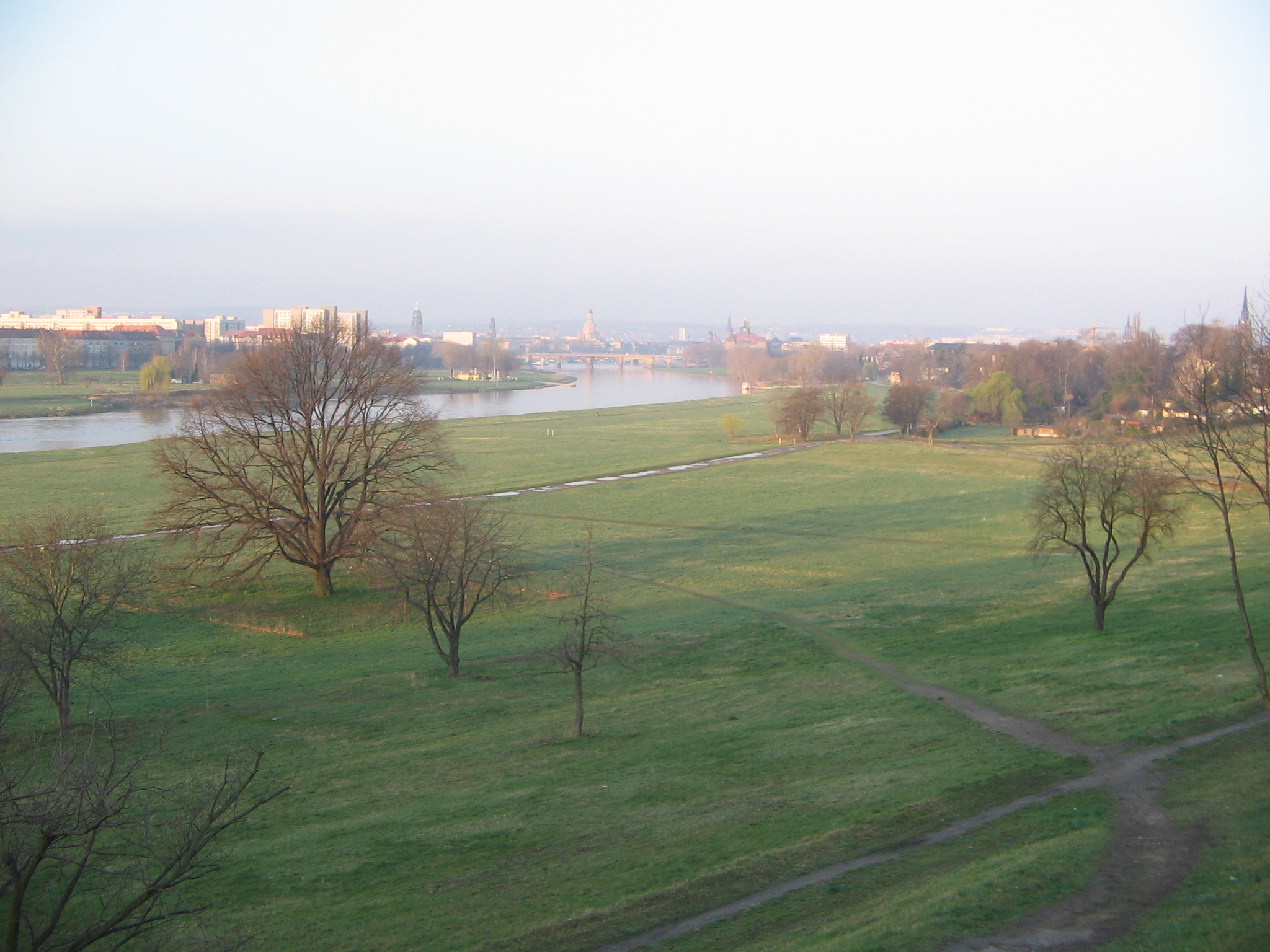 Blick vom Aussichtspunkt am Waldschlößchen